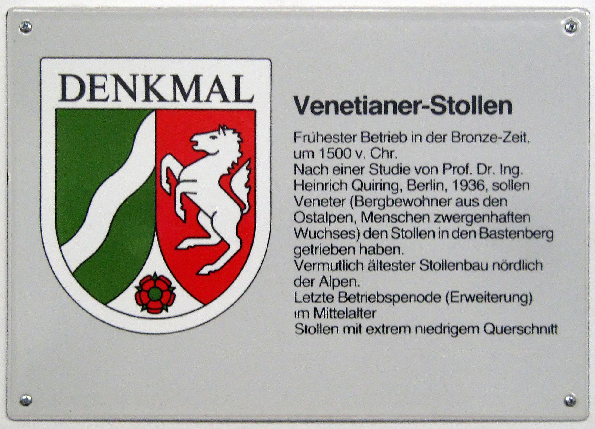 Ramsbeck, Bergbaumuseum, Venetianerstollen Bastenberg, Denkmalstafel